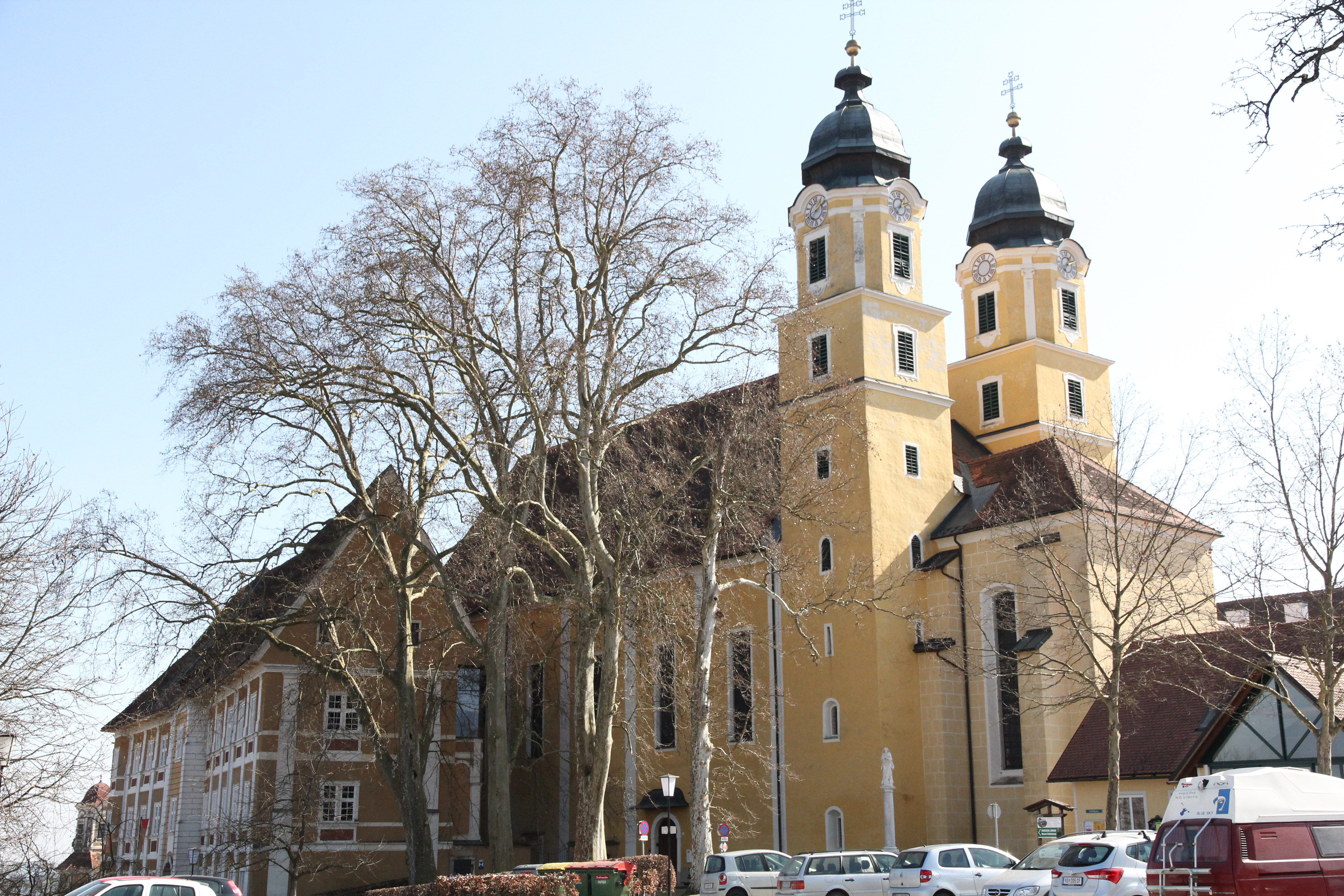 Katholische Pfarrkirche Hl. Katharina (ehemalige Stiftskirche)